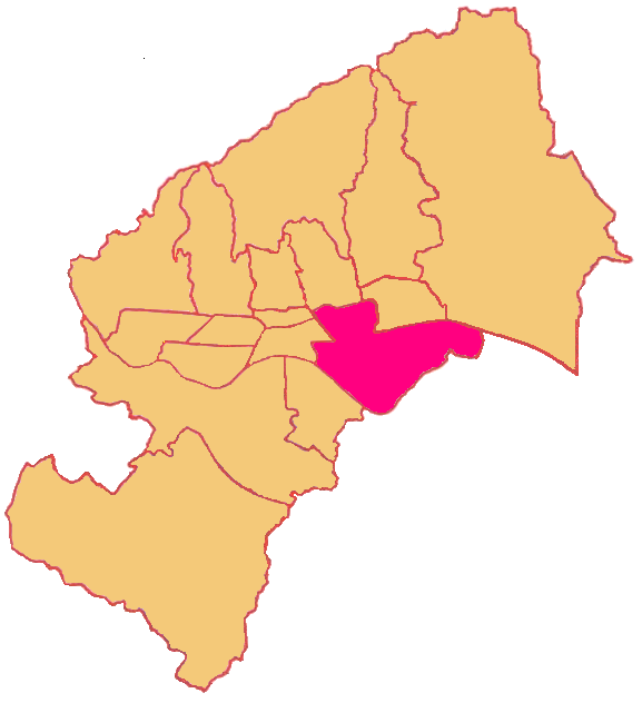 Map of Peščenica - Žitnjak District in Zagreb (Gradska četvrt Peščenica - Žitnjak)